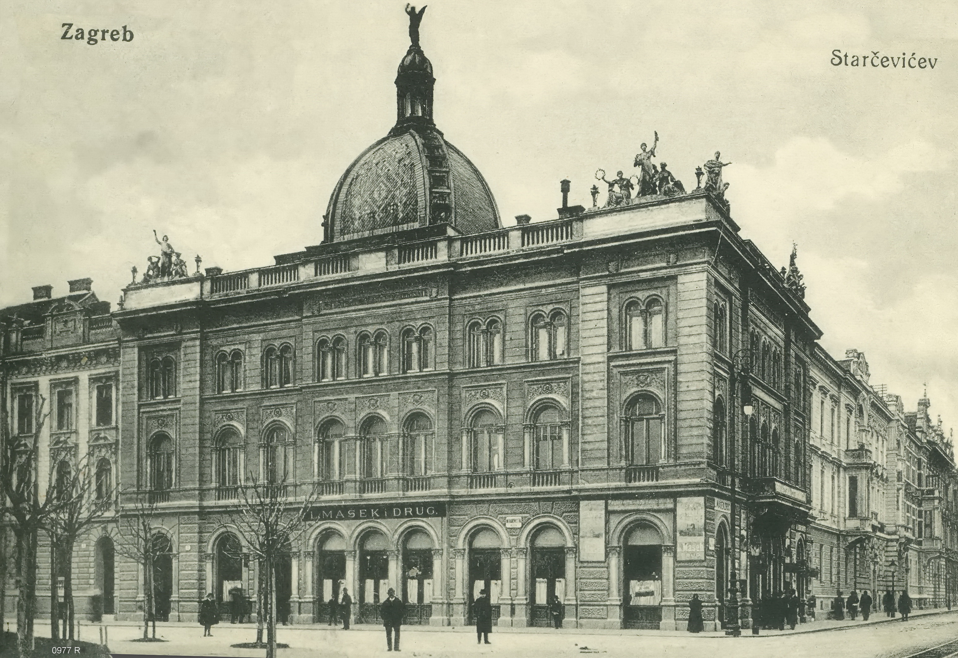 Starčevićev dom. Dopisnica poslana u Beč iz Zagreba. 4. listopad 1913.